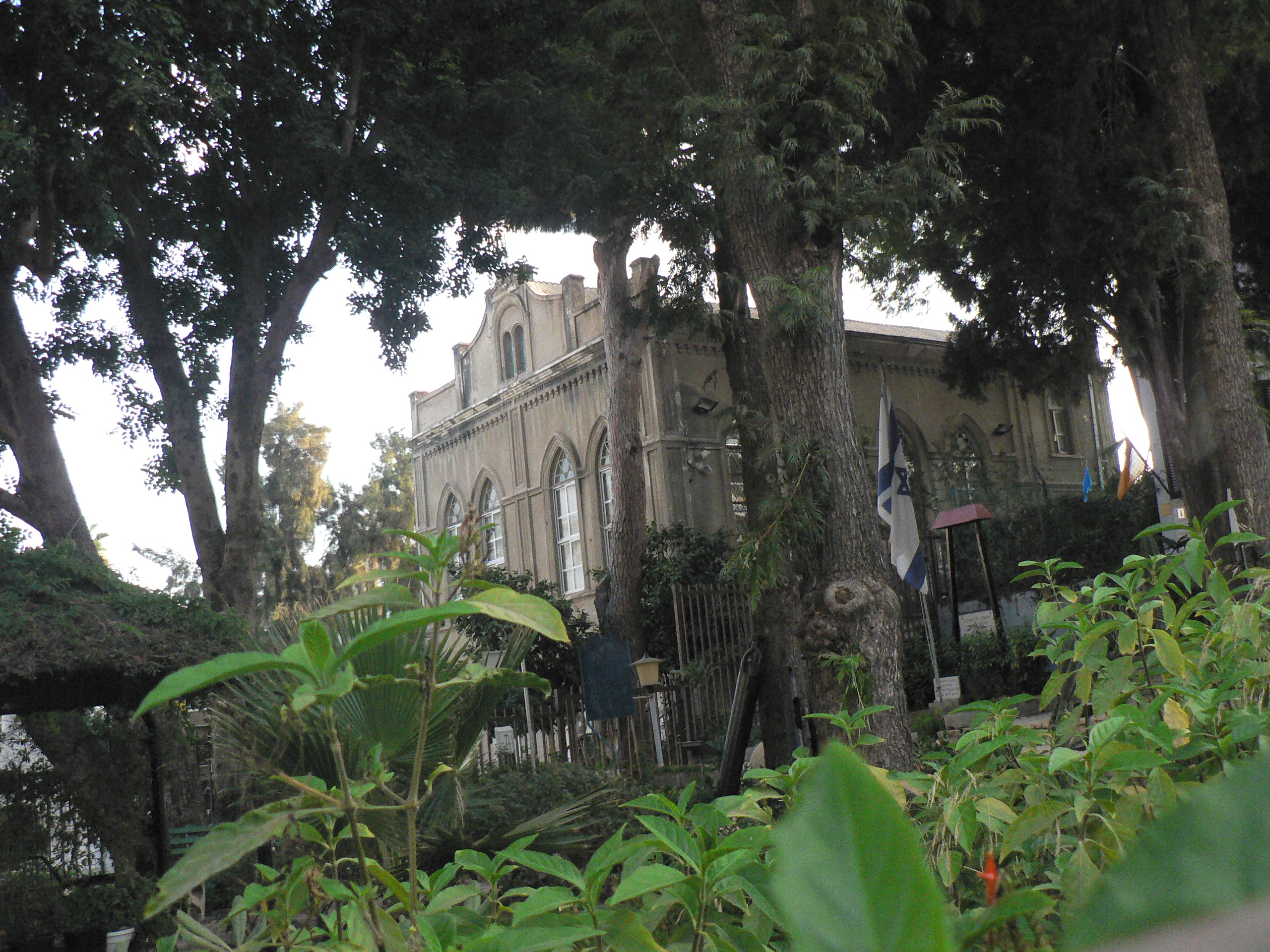 Ness Ziona נס ציונה Rishonim Synagogue בית הכנסת ראשונים